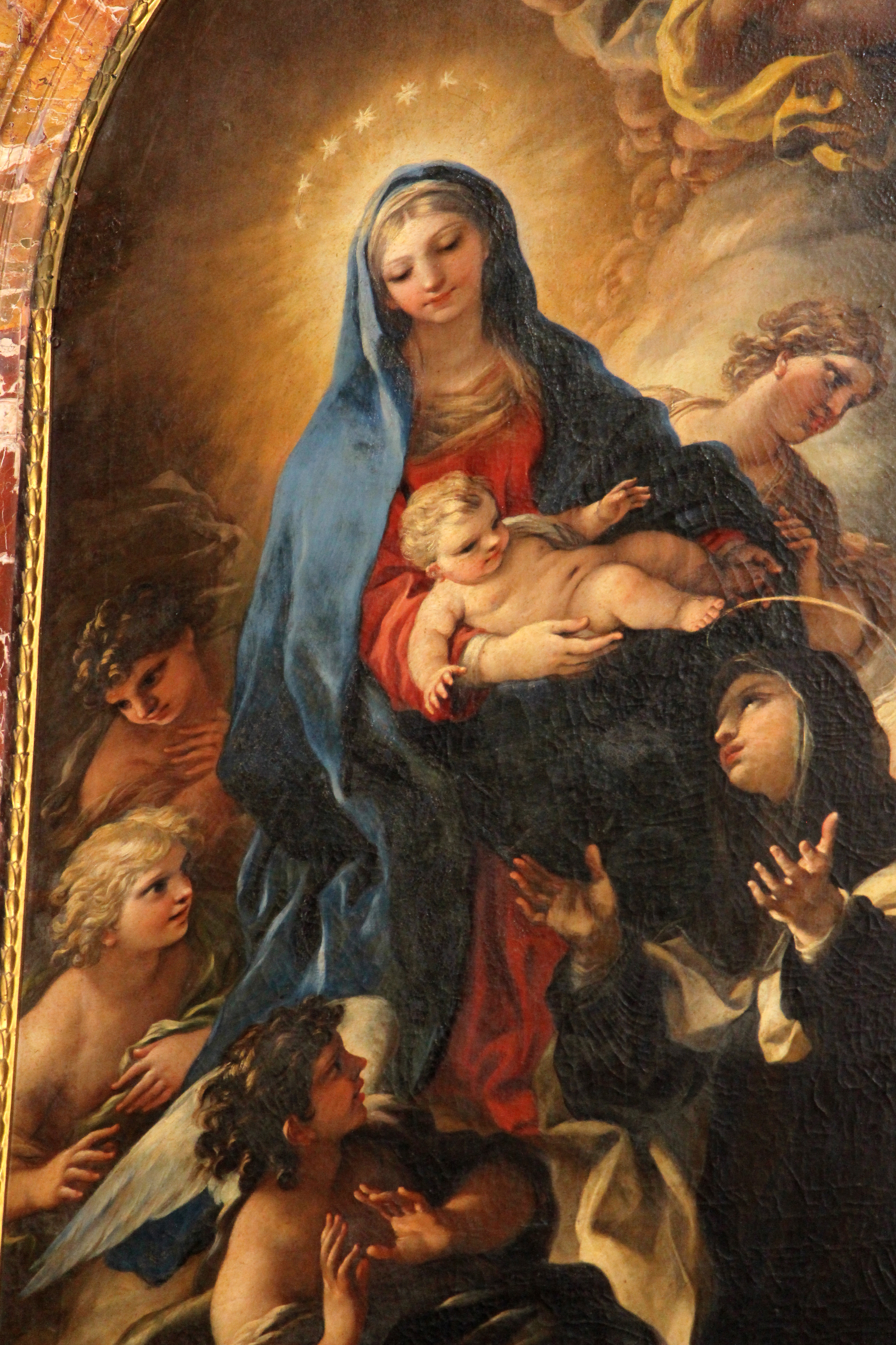 Vergine presenta il Bambino a santa Maria Maddalena dei Pazzititle QS:P1476,it:"Vergine presenta il Bambino a santa Maria Maddalena dei Pazzi" label QS:Lit,"Vergine presenta il Bambino a santa Maria Maddalena dei Pazzi"